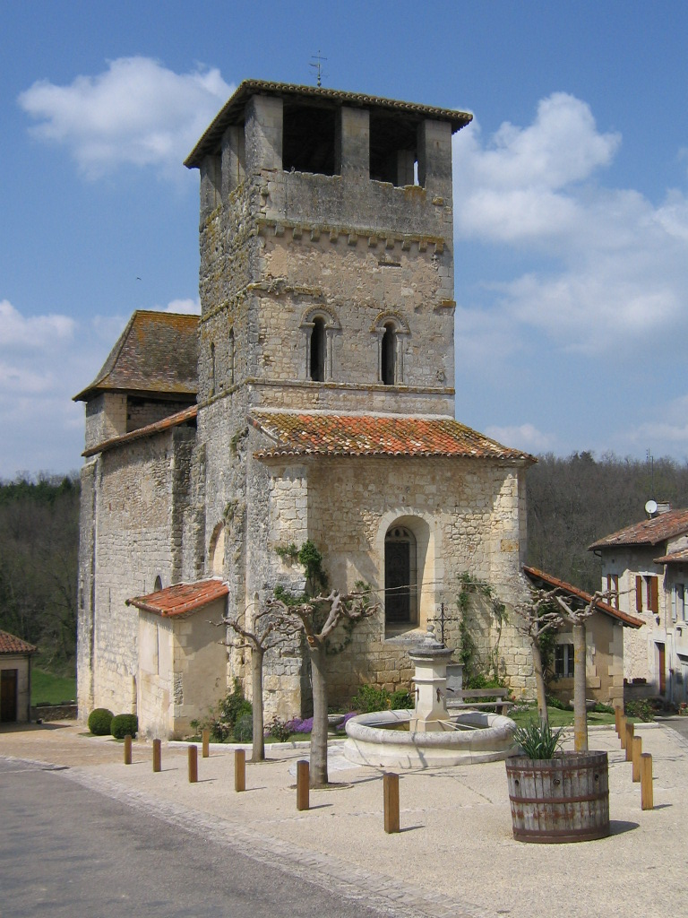 Eglise de Siorac près de Riberac (Dordogne)